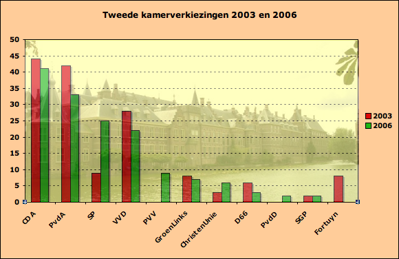 Uitslag Tweede Kamerverkiezingen 2006 vertaald in zetels